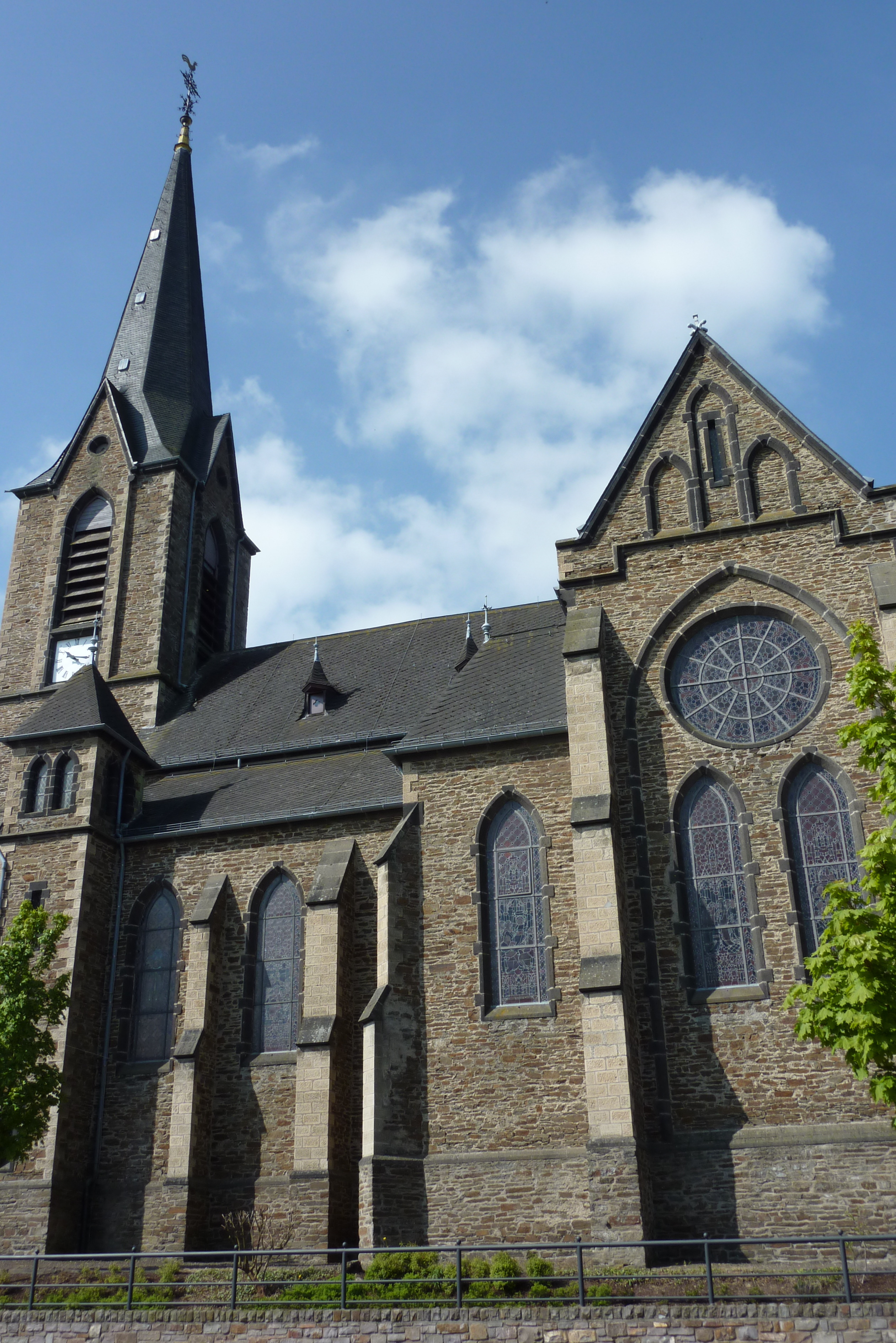 katholische Pfarrkirche St. Quirinus in Langenfeld (Eifel), Längsseite